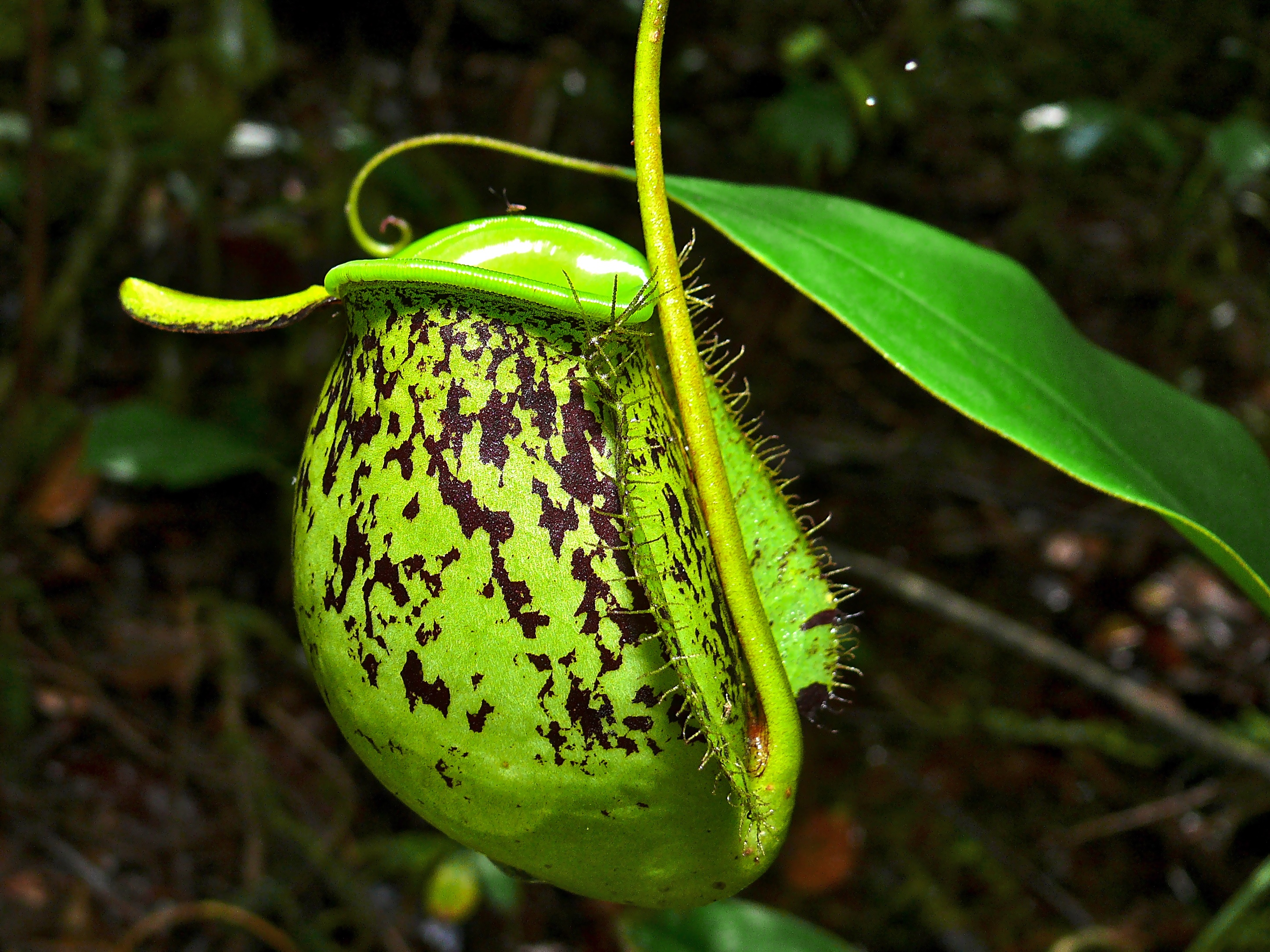 Gunung Mulu NP, Sarawak, MALAYSIA